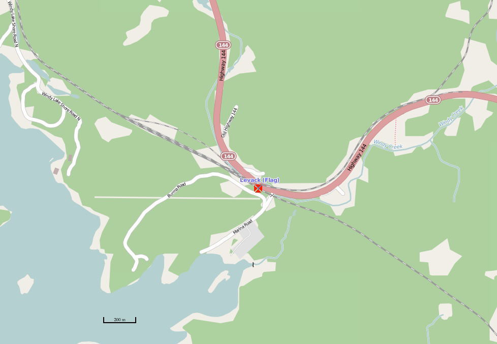 Carte avec l'emplacement du point d'arrêt (gare) de Levack, située au lieu dit Levack station sur le territoire de la municipalité de Onaping Falls (en), partie de la municipalité régionale de Sudbury Ontario Canada.